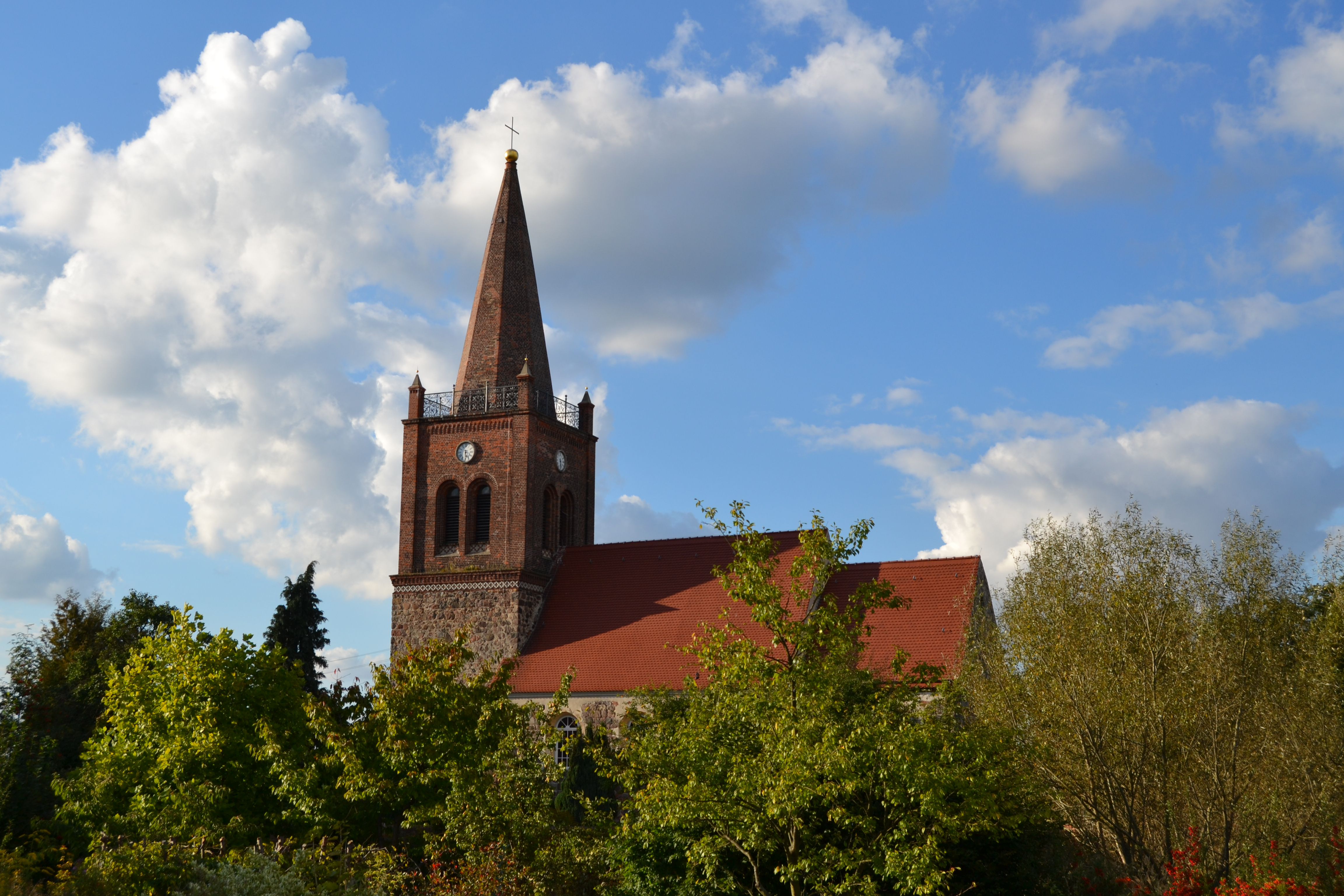 Dorfkirche Marxdorf: Der Templerorden als Patronatsherr errichtete die Dorfkirche in Feldsteinquaderbauweise mit eingezogenem Rechteckchor und den Turm in Schiffsbreite.